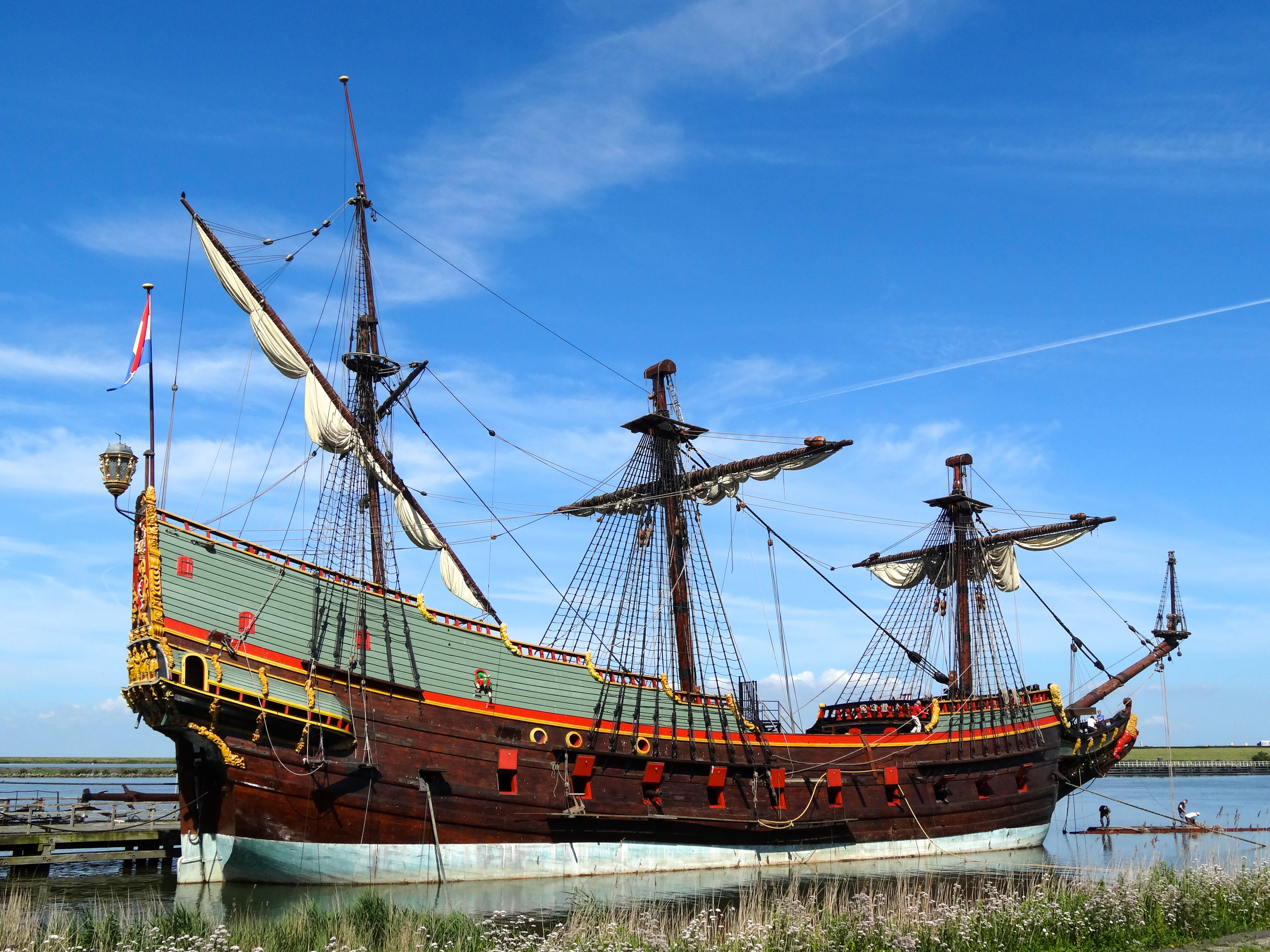 Replica van het VOC-schip de Batavia, Bataviawerf, Lelystad